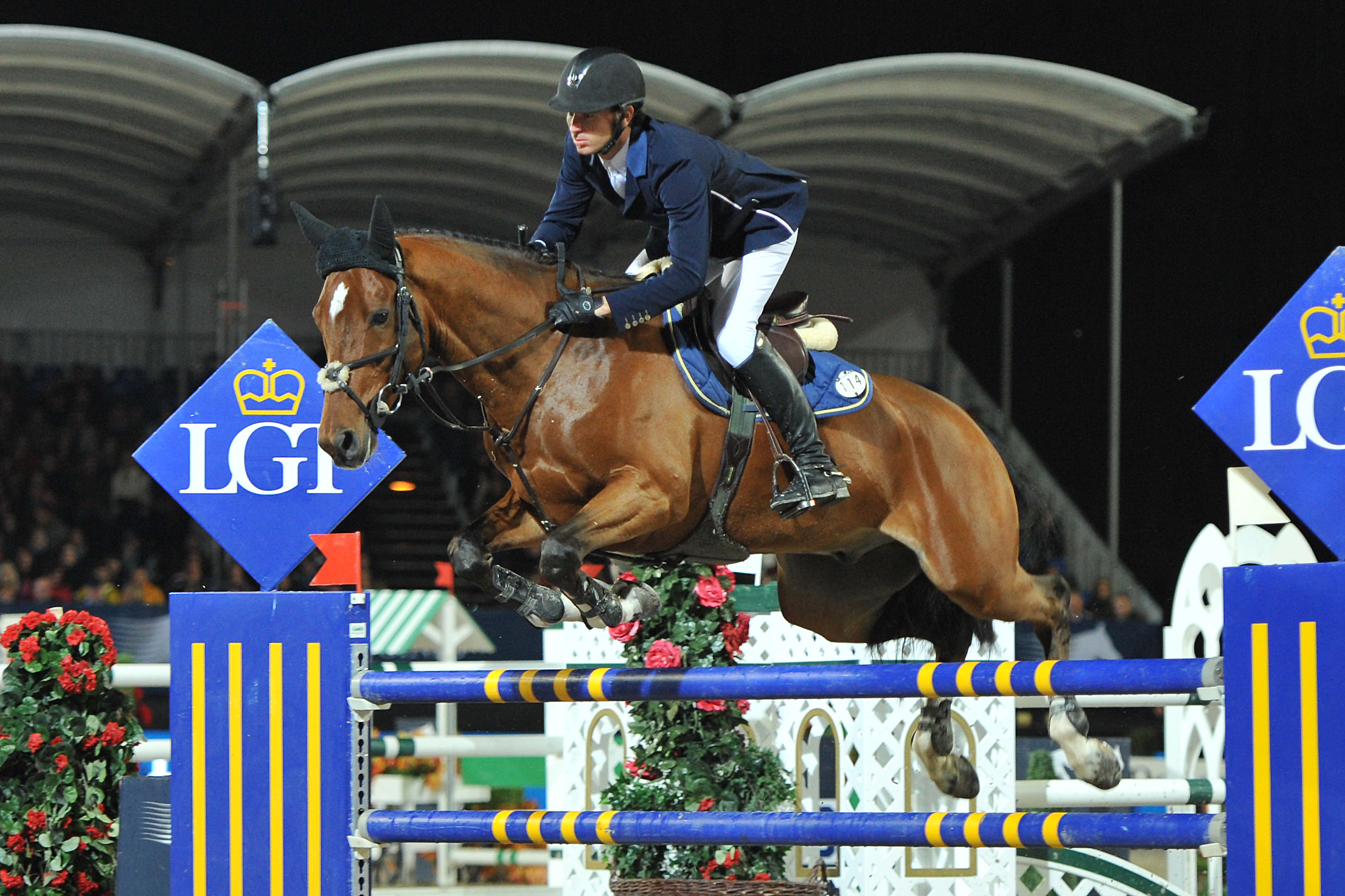 Vienna Masters am 21. September 2013 Longines Global Champions Tour Steve Guerdat (SUI) auf Zanzibar